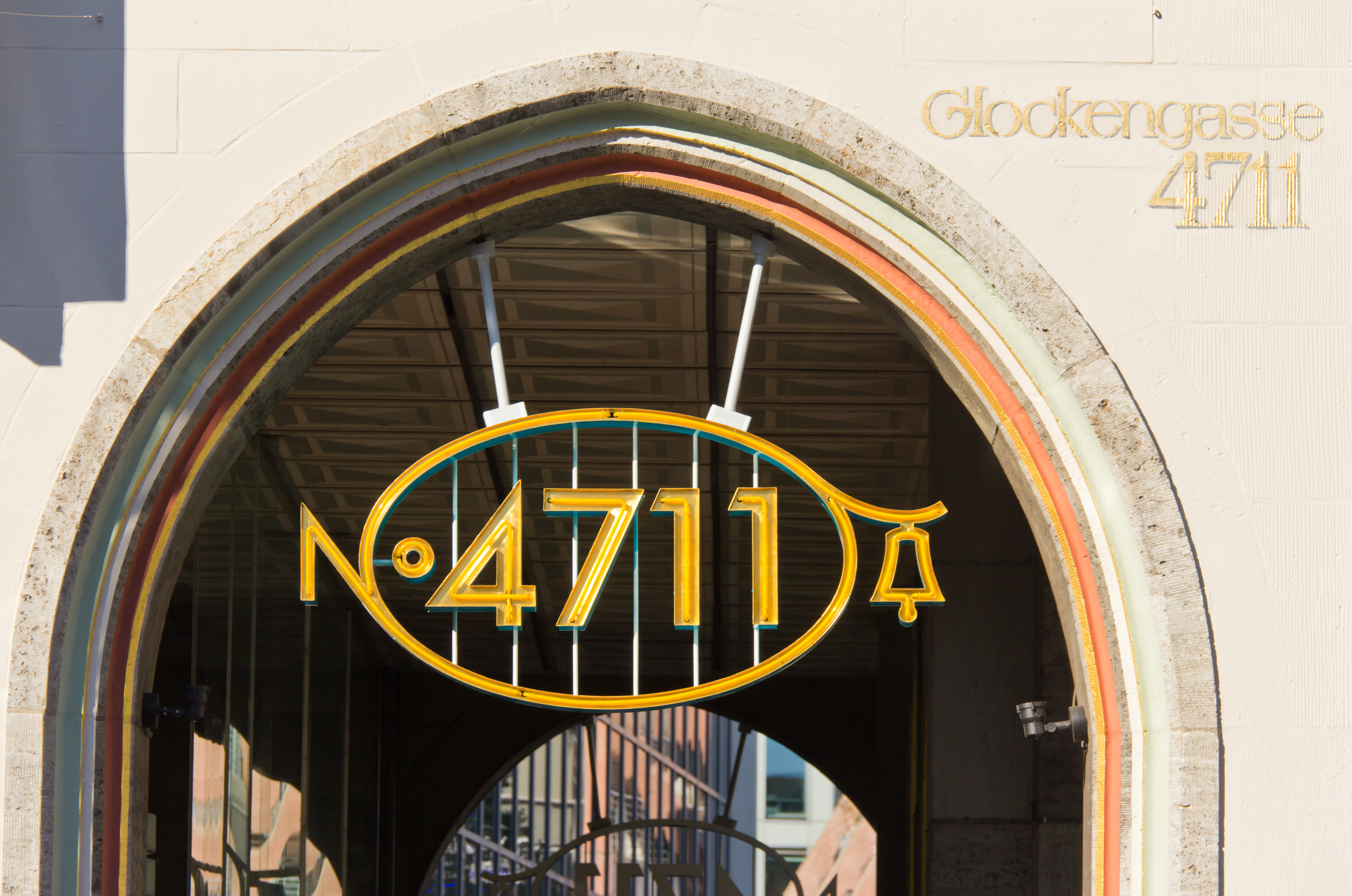 Modernisiertes 4711-Logo am Stammhaus in der Glockengasse, Köln.